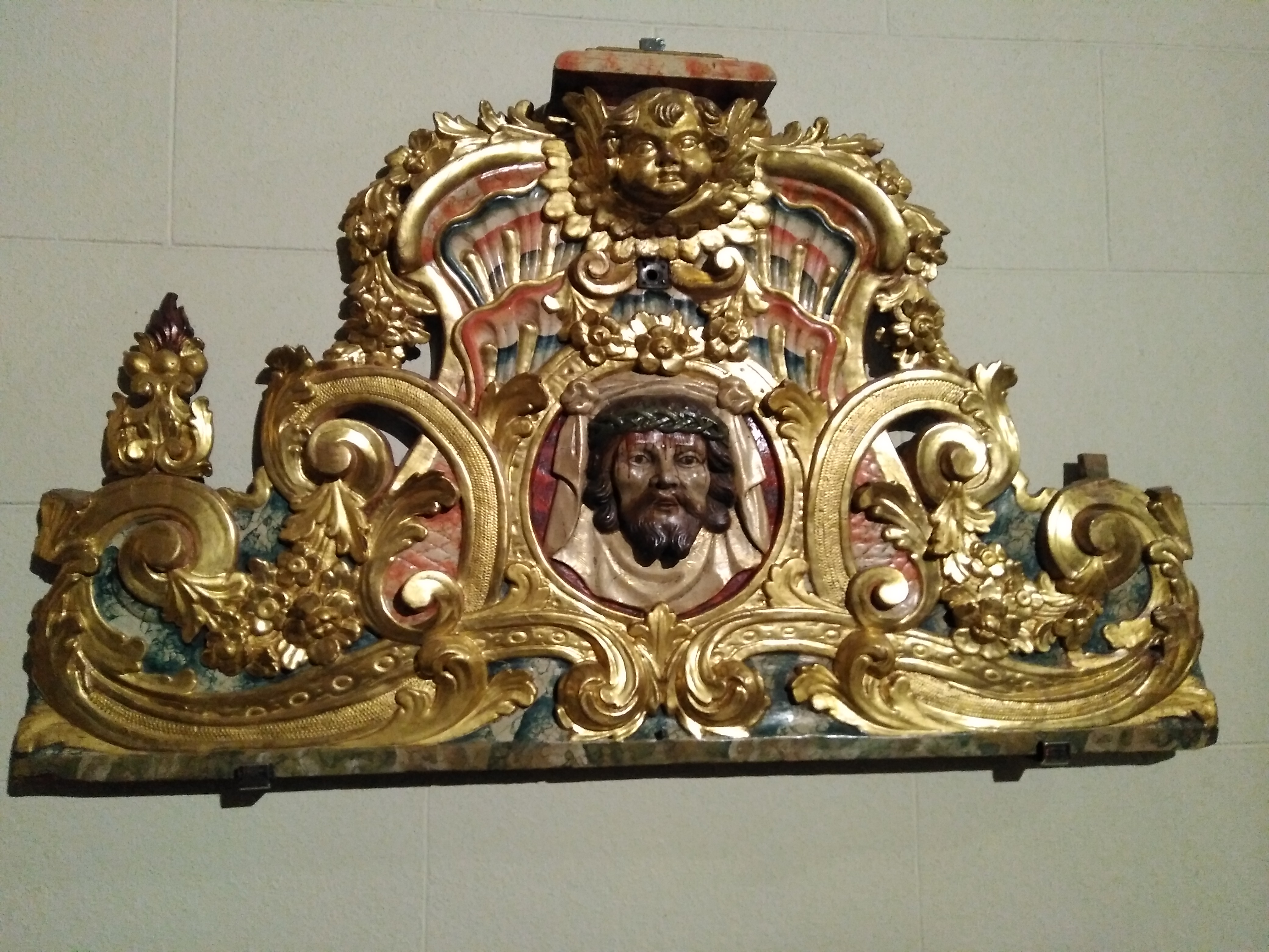 Part posterior del misteri barroc de la Pietat, una obra del segle XVII de Lluís Bonifaç, a Riudoms